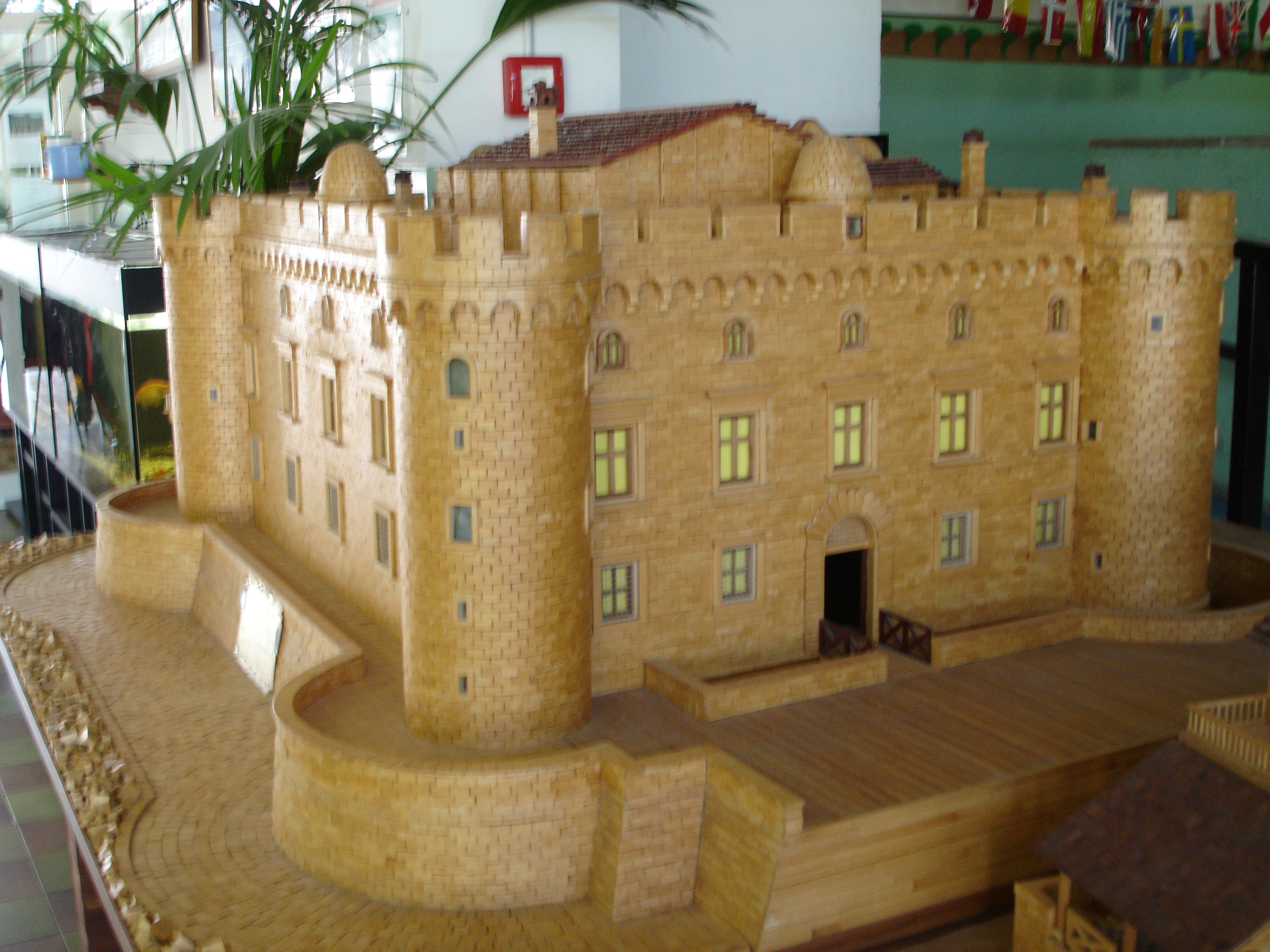 Modellino del Castello di Palo presso la scuola elementare di Castellamare a Ladispoli.Autore Roberto Zoffoli